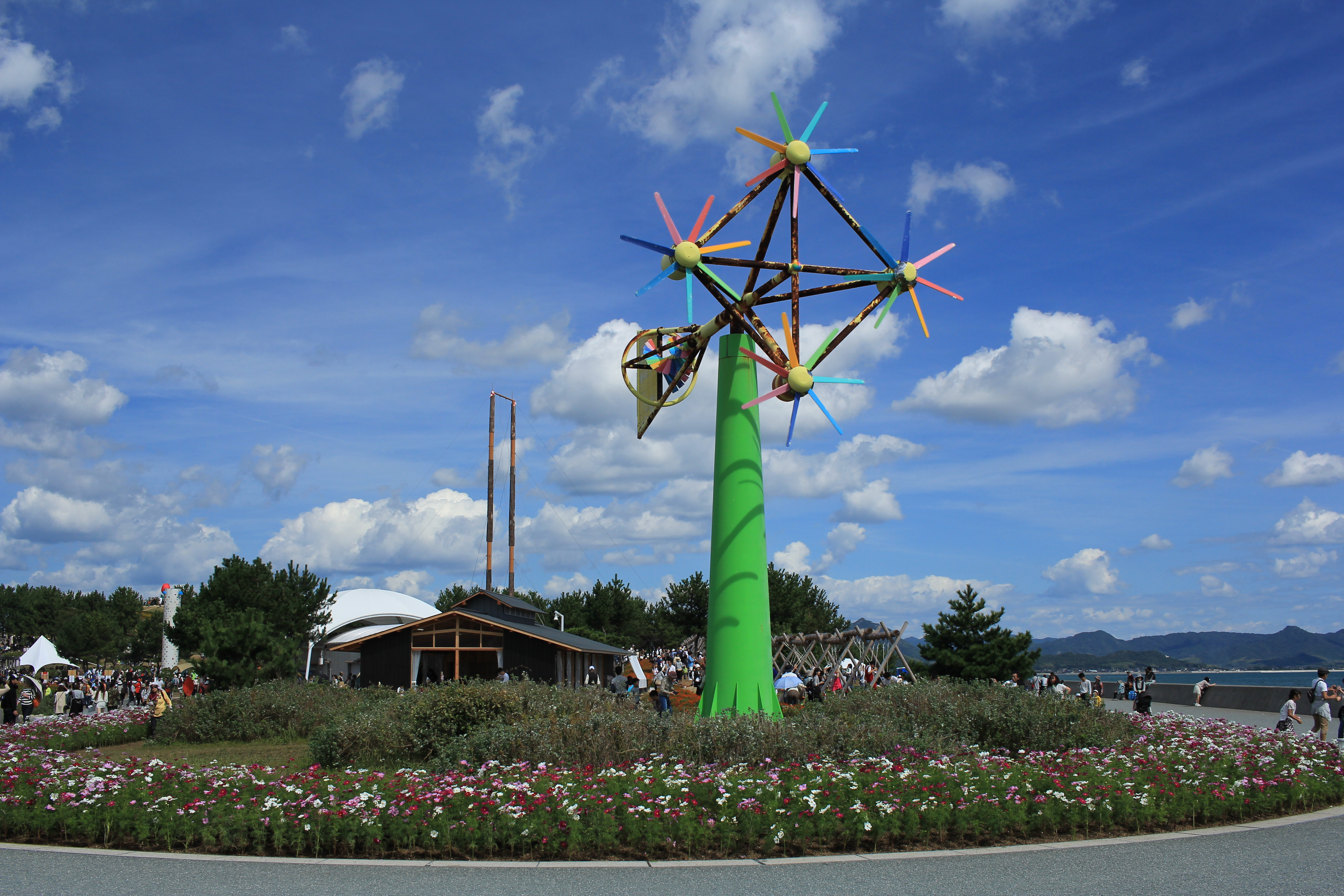 山口きらら博記念公園にあるきらら風車 Canon EOS 60D